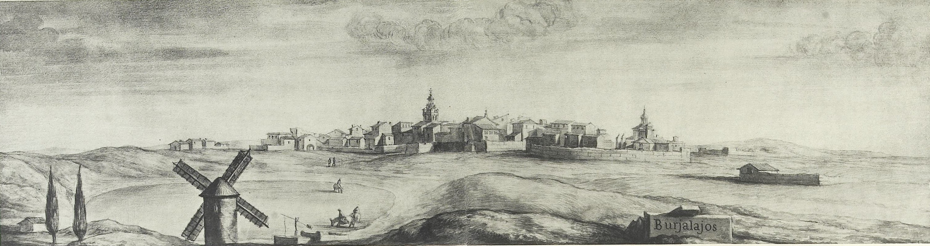 Bujaraloz (Burjalajos), acuarela de Pier Maria Baldi, Biblioteca Laurenciana de Florencia, recogida en Sánchez Rivero A, Mariutti de Sánchez Rivero A. "Viaje de Cosme de Médicis por España y Portugal (1668-1669)", Madrid: Sucesores de Rivadeneyra; 1933